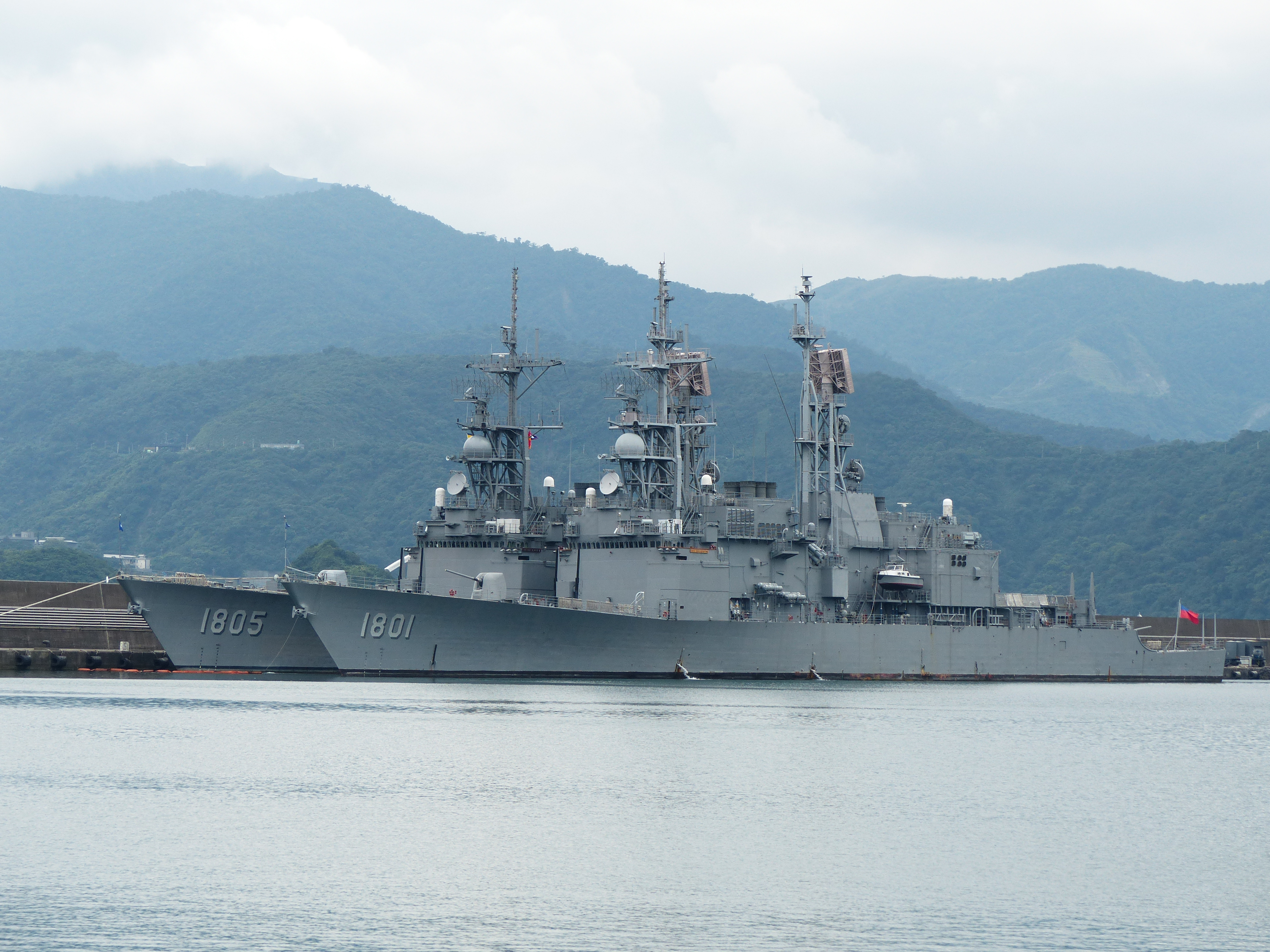 並泊中正軍港碼頭的基隆級驅逐艦基隆（右）與馬公（左）。